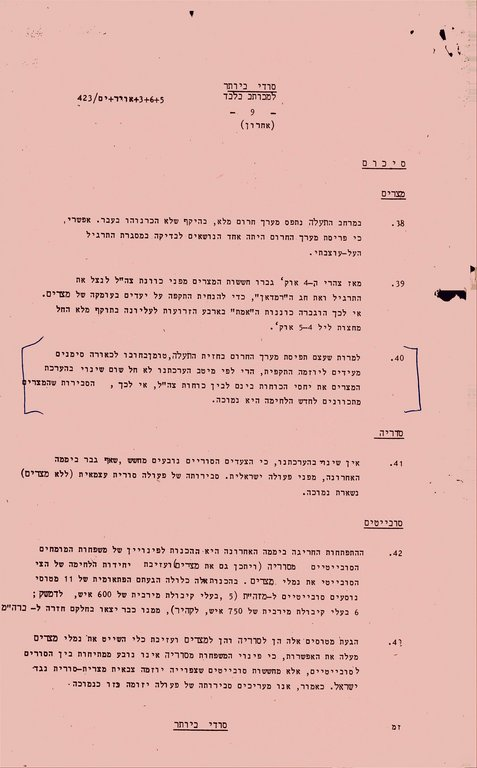 לקט המודיעין שכתב ב-5 באוקטובר יונה בנדמן באמ"ן, יום לפני מלחמת יום הכיפורים, ובו הסימנים המעידים על מלחמה. ללקט זה הוסיף בנדמן את סעיף 40, שבו קבע כי למלחמה סבירות נמוכה.